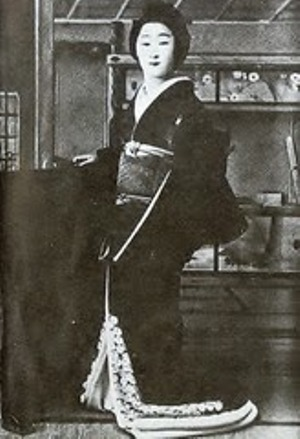 芸者姿のモルガンお雪